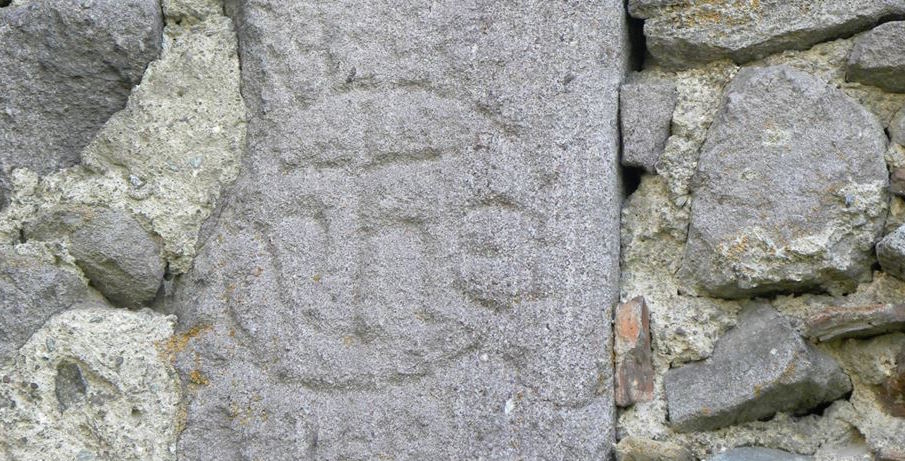 Incisione cristogramma di Bernardino su portale in Verrucano Lombardo